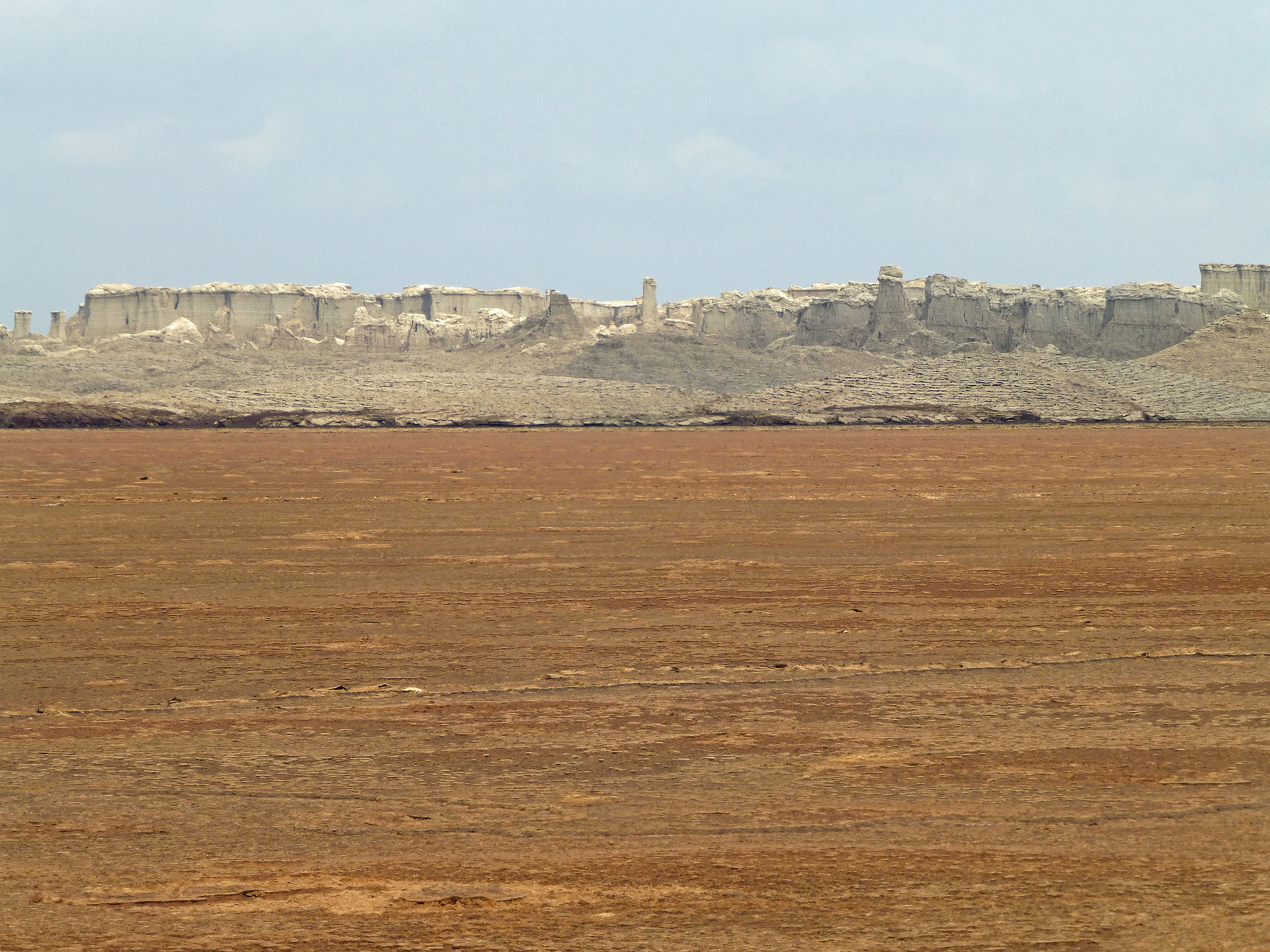 Dallol (Ethiopie, région Afar, Danakil) : au bord du lac acide